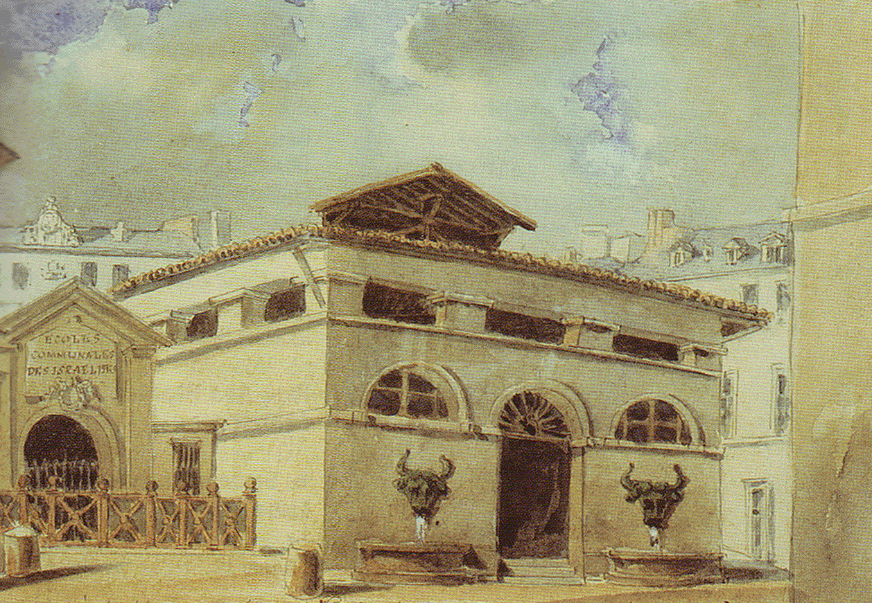 La fontaine de la boucherie du marché des Blancs-Manteaux. Aquarelle d'Amlin, Paris et ses fontaines, 1852